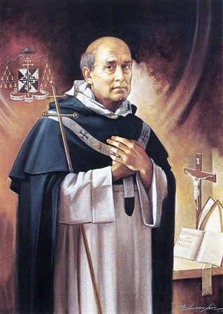 Beato Bartolomeo Fernandes dei Martiri, dipinto di Giuseppe Antonio Lomuscio